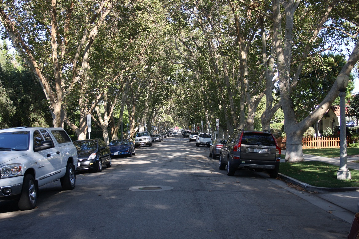 Vue de la rue devant la maison de Malcolm dans la série Malcolm in the Middle, Los Angeles, États-Unis.